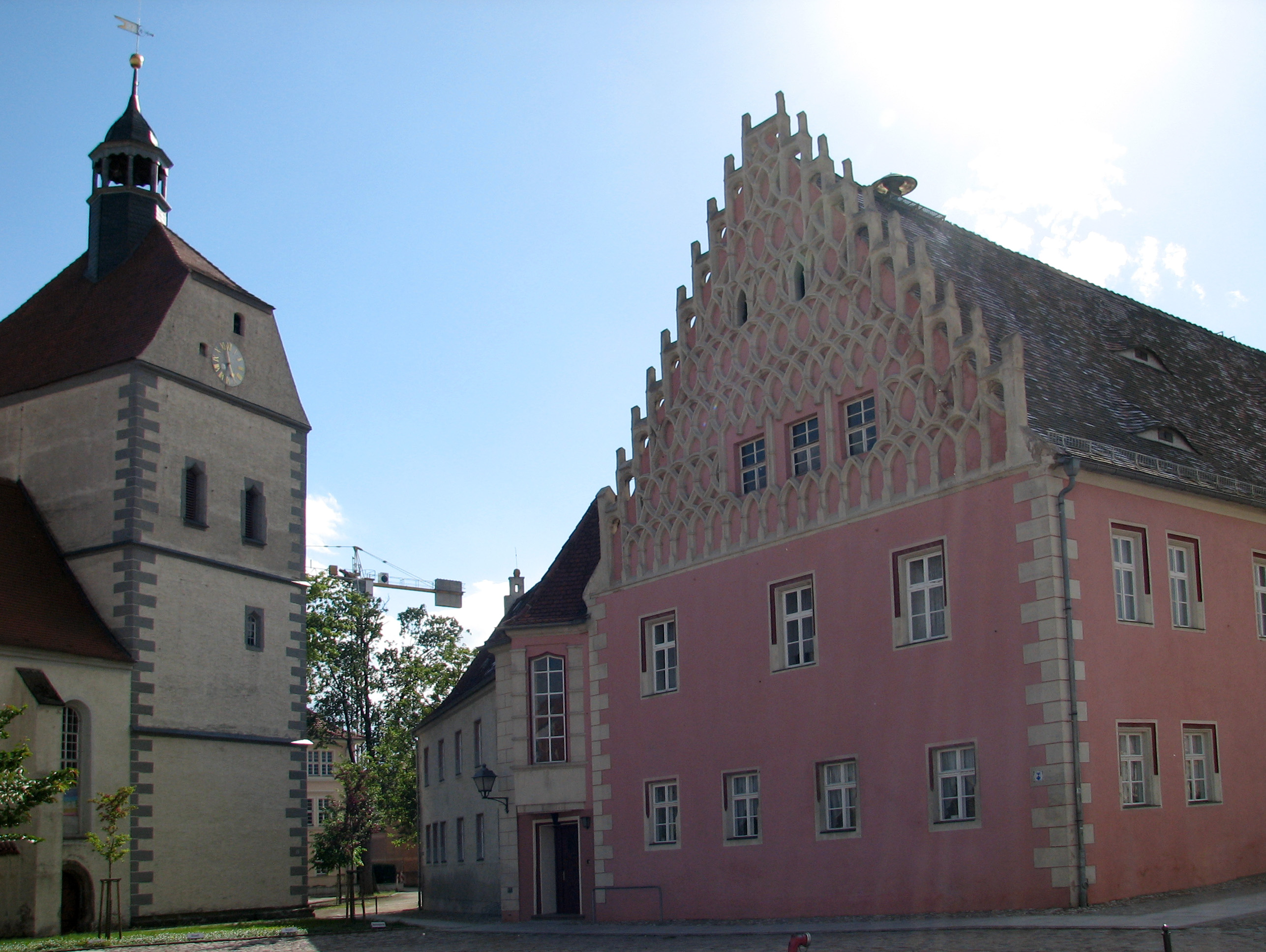 Kirche und Rathaus von Mühlberg, Deutschland.